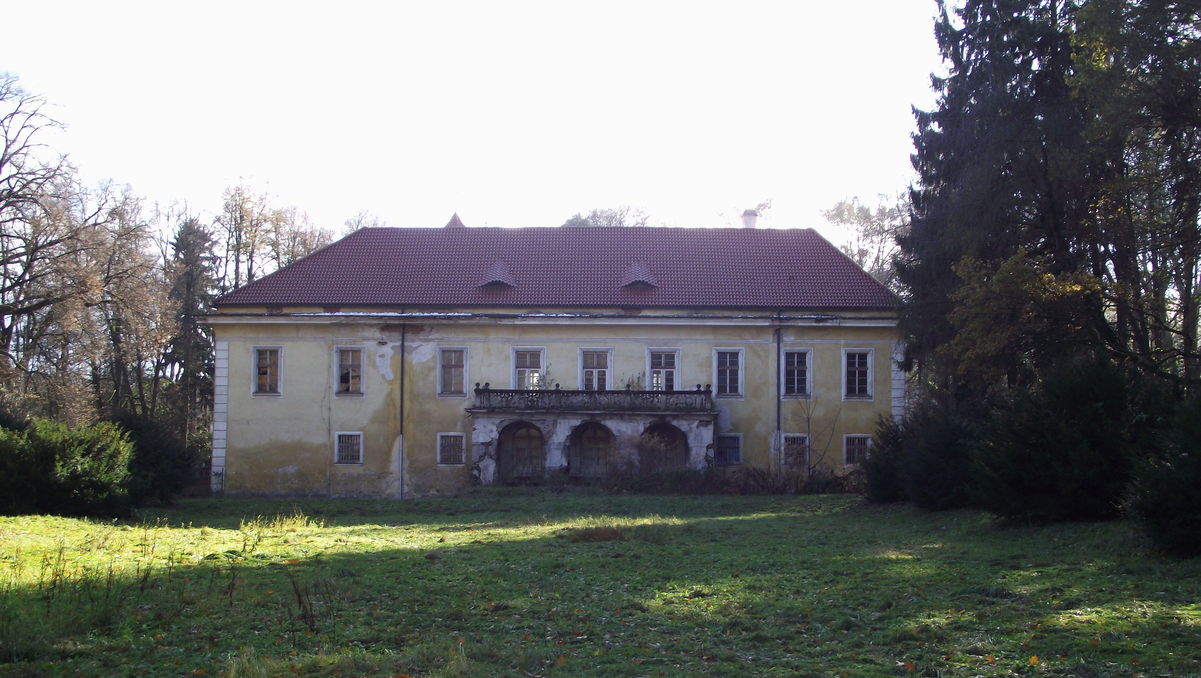 Zámek Lukavec, okres Pelhřimov